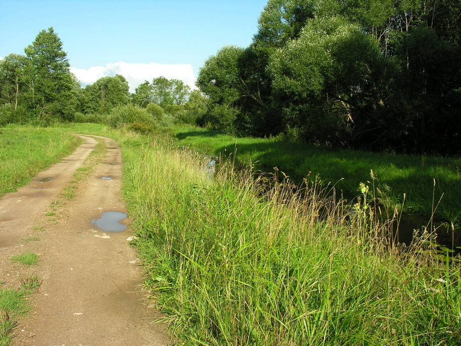 Meškeliai, Mažeikių rajonas, Viekšnių seniūnija Kelias į buv.Meškelių dvaro kumetyną palei Pievį Foto: Algirdas, 2006 m. rugpjūčio 20 d., Lietuva